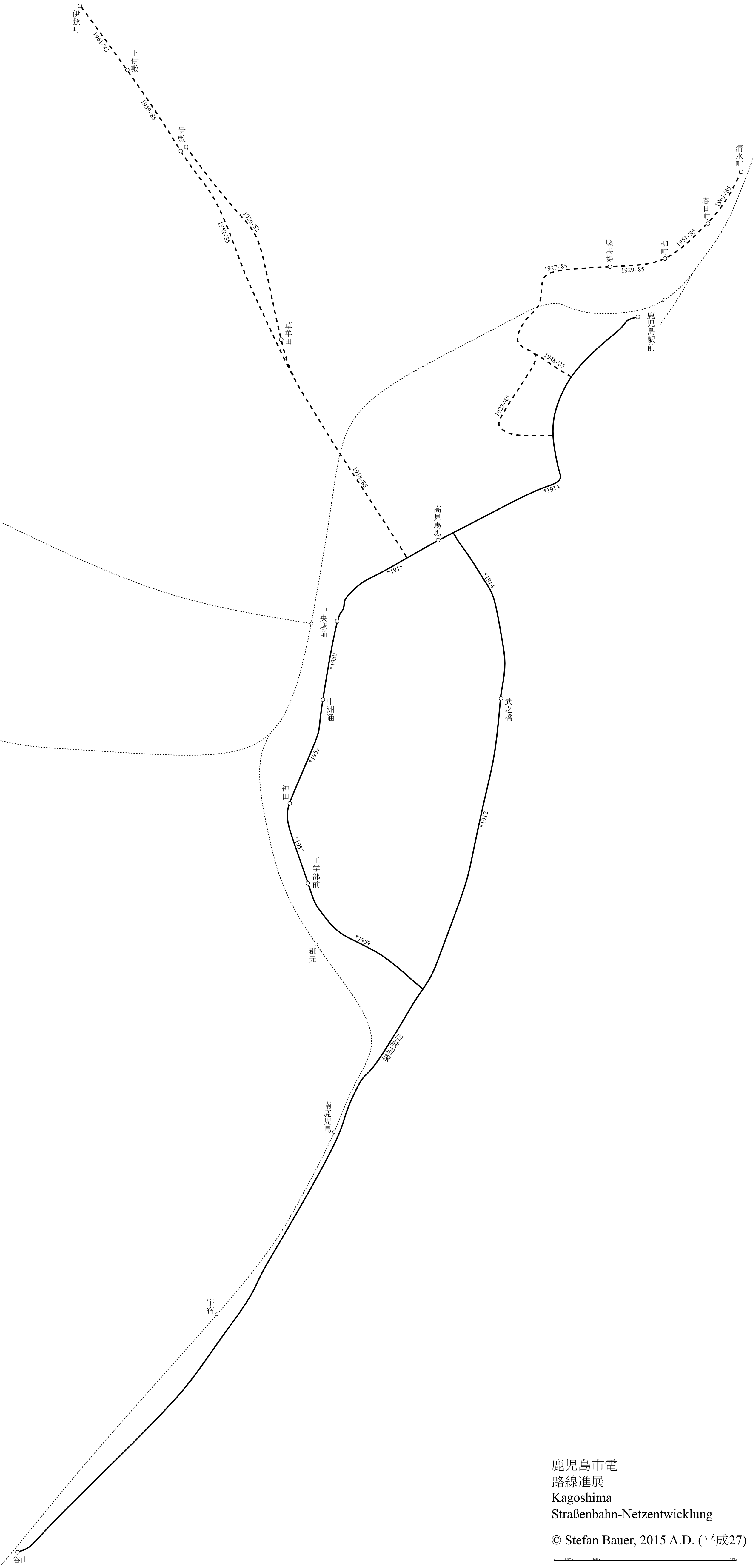 鹿児島市電の路線進展図